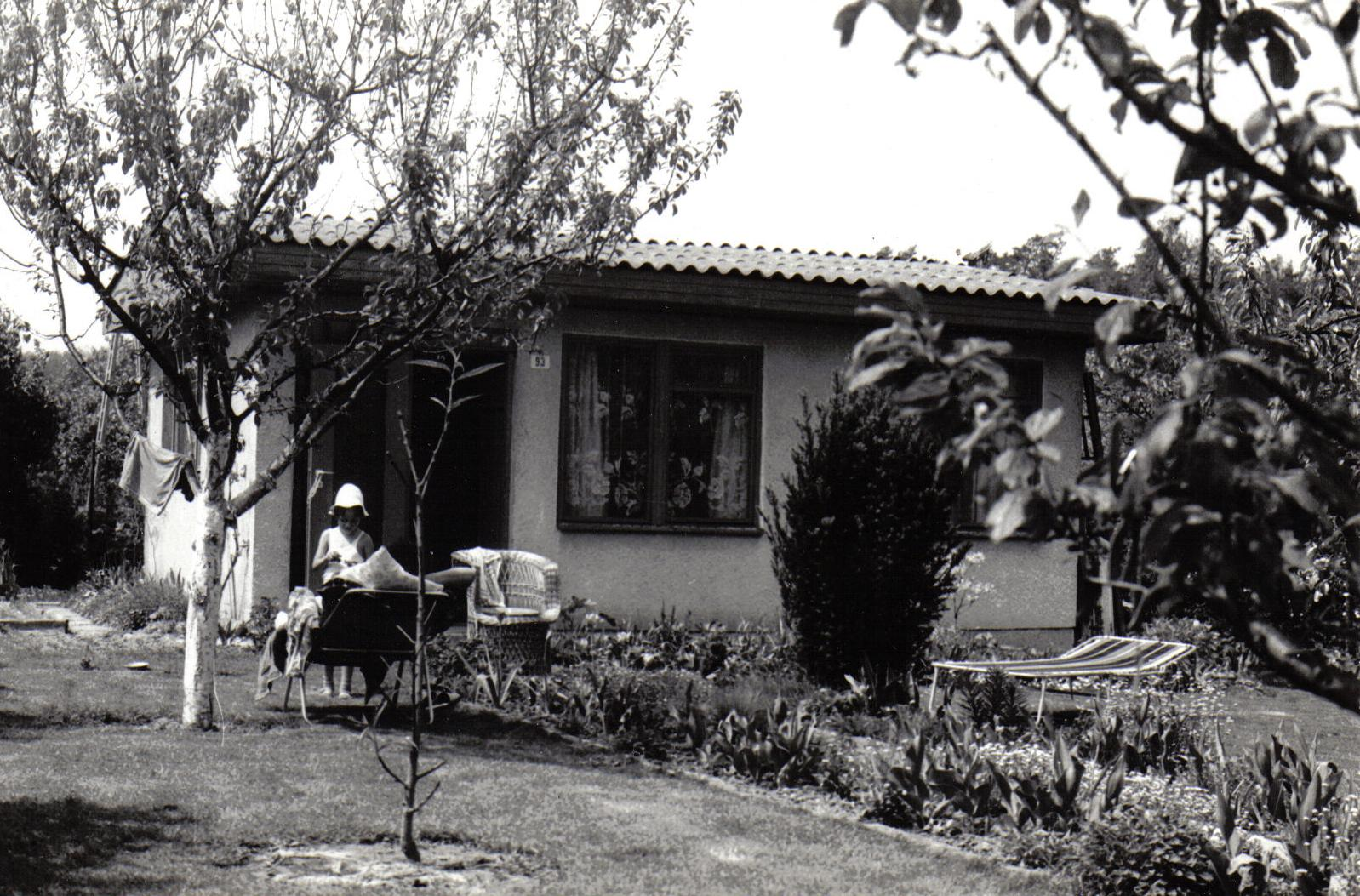 Allotment gardens in Kierszek, Poland